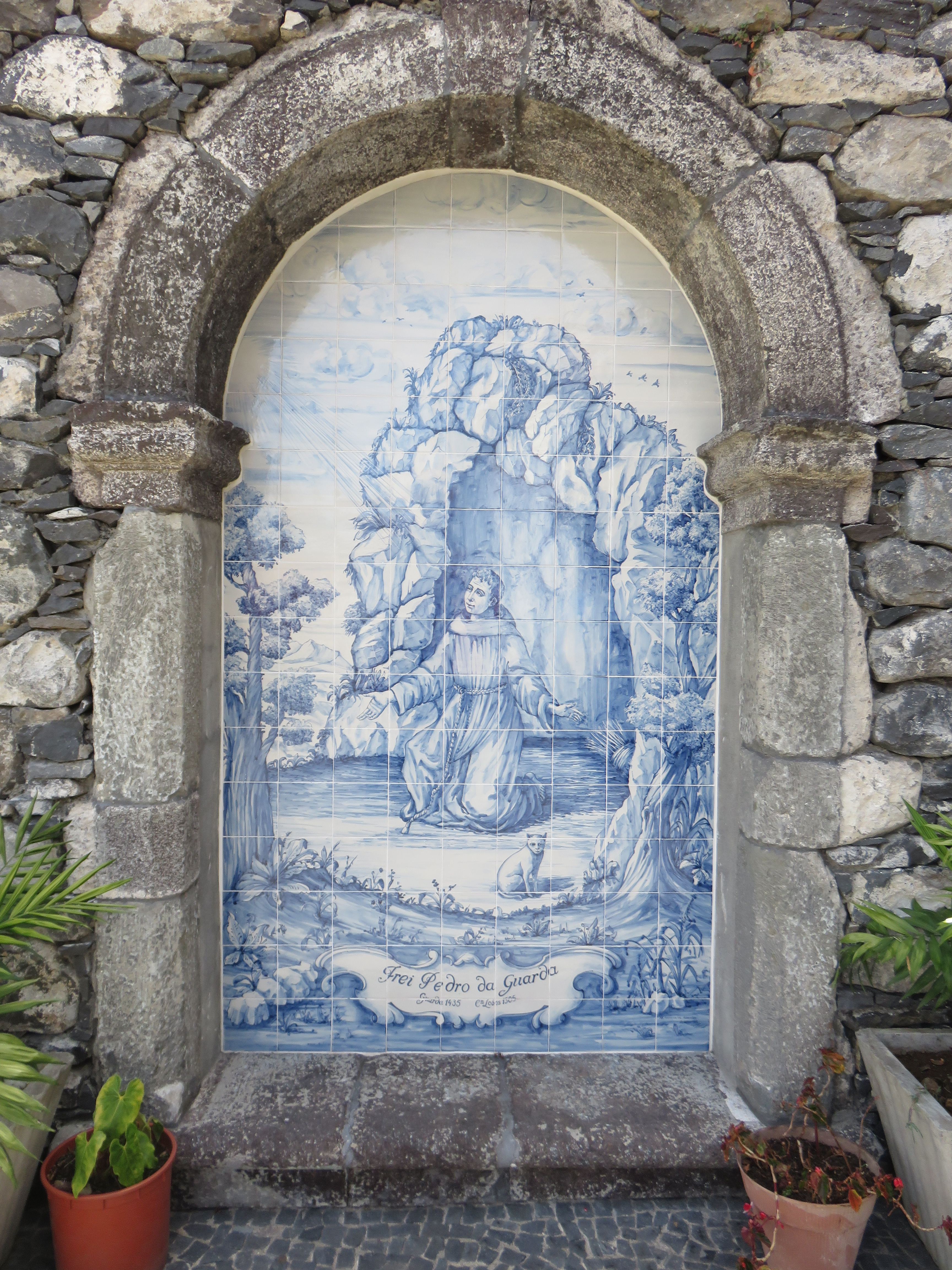 Convento de São Bernardino - convento em Câmara de Lobos, Madeira, Portugal Cultural property Convento de São Bernardino, Câmara de Lobos, Madeira, Portugal Q63895143, VIAF ID: 39150323647009971052, SIPA ID: 8046 Wiki Loves Monuments ID: DRC-M-220201007